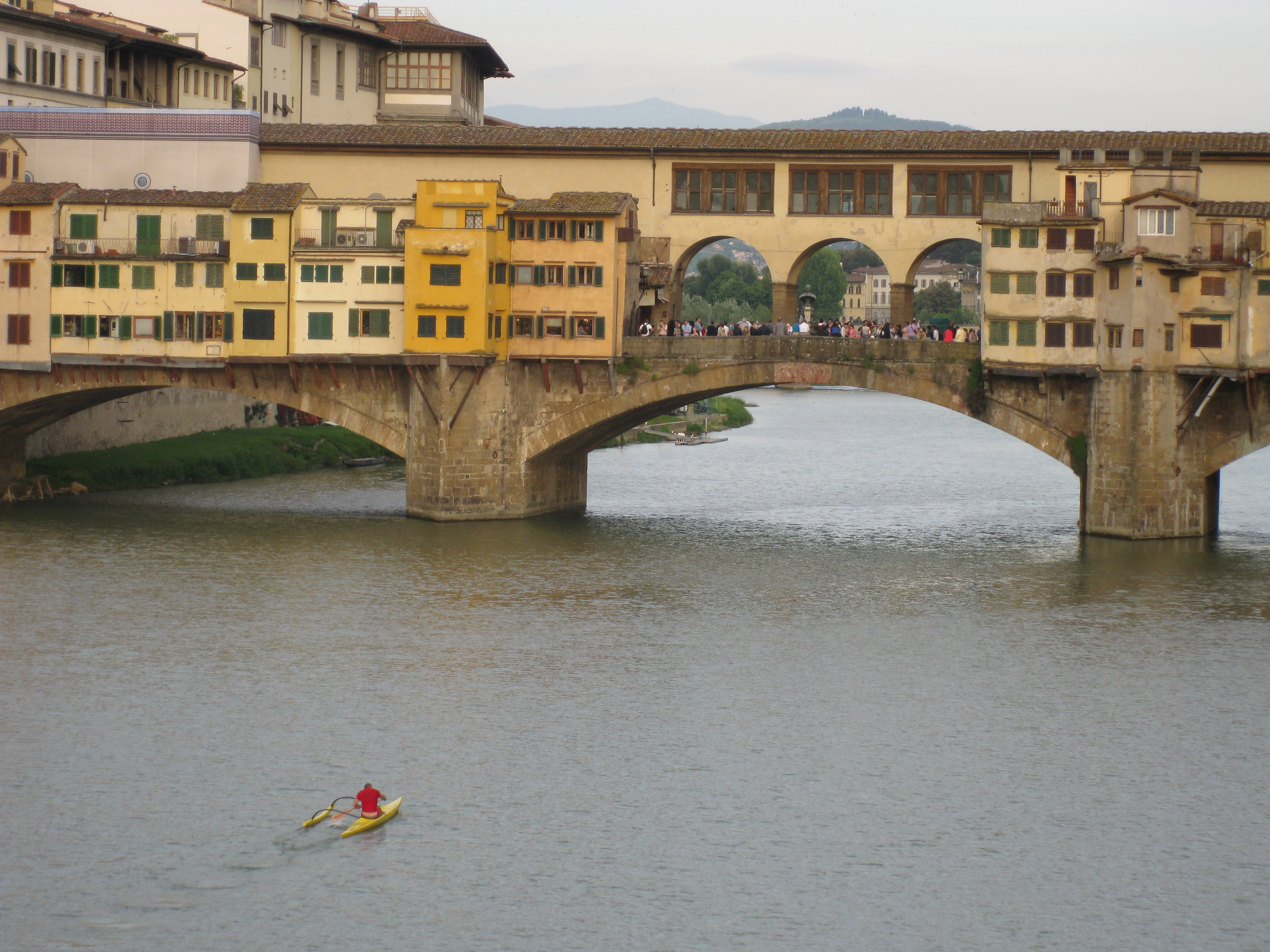 Vasari Corridor מעבר ואזארי